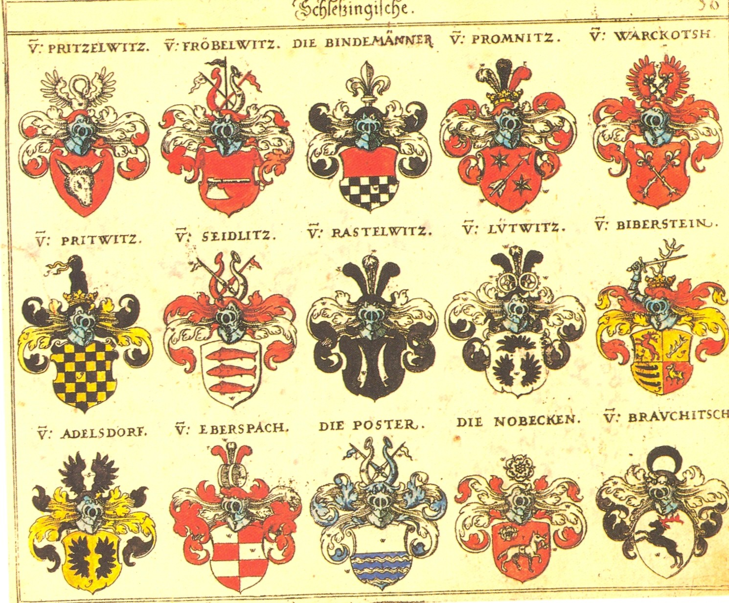 Johann Siebmacher: New Wappenbuch eingescannt aus: Horst Appuhn (Hrsg.), Johann Siebmachers Wappenbuch. Die bibliophilen Taschenbücher 538, 2. verb. Aufl , Dortmund 1989 Schlesische Blatt 56